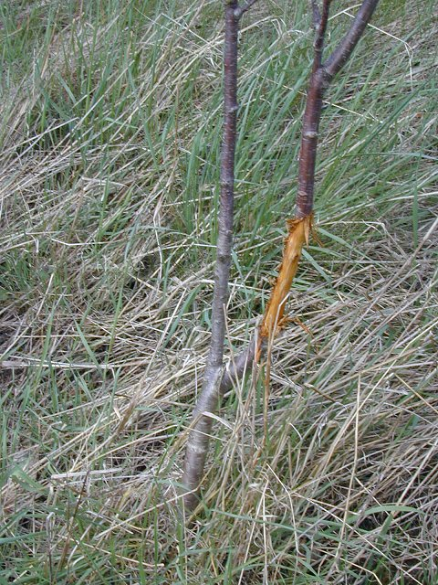 Fegeschaden durch einen Rehbock an einer jungen Kirsche, bei der durch die Zwieselbildung eine vorherige, mehrfache Schädigung durch Wildverbiss zu vermuten ist.